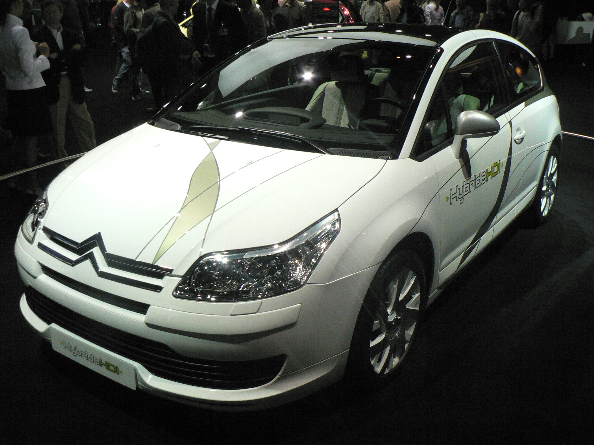 Mondial de l'automobile, Paris 2006